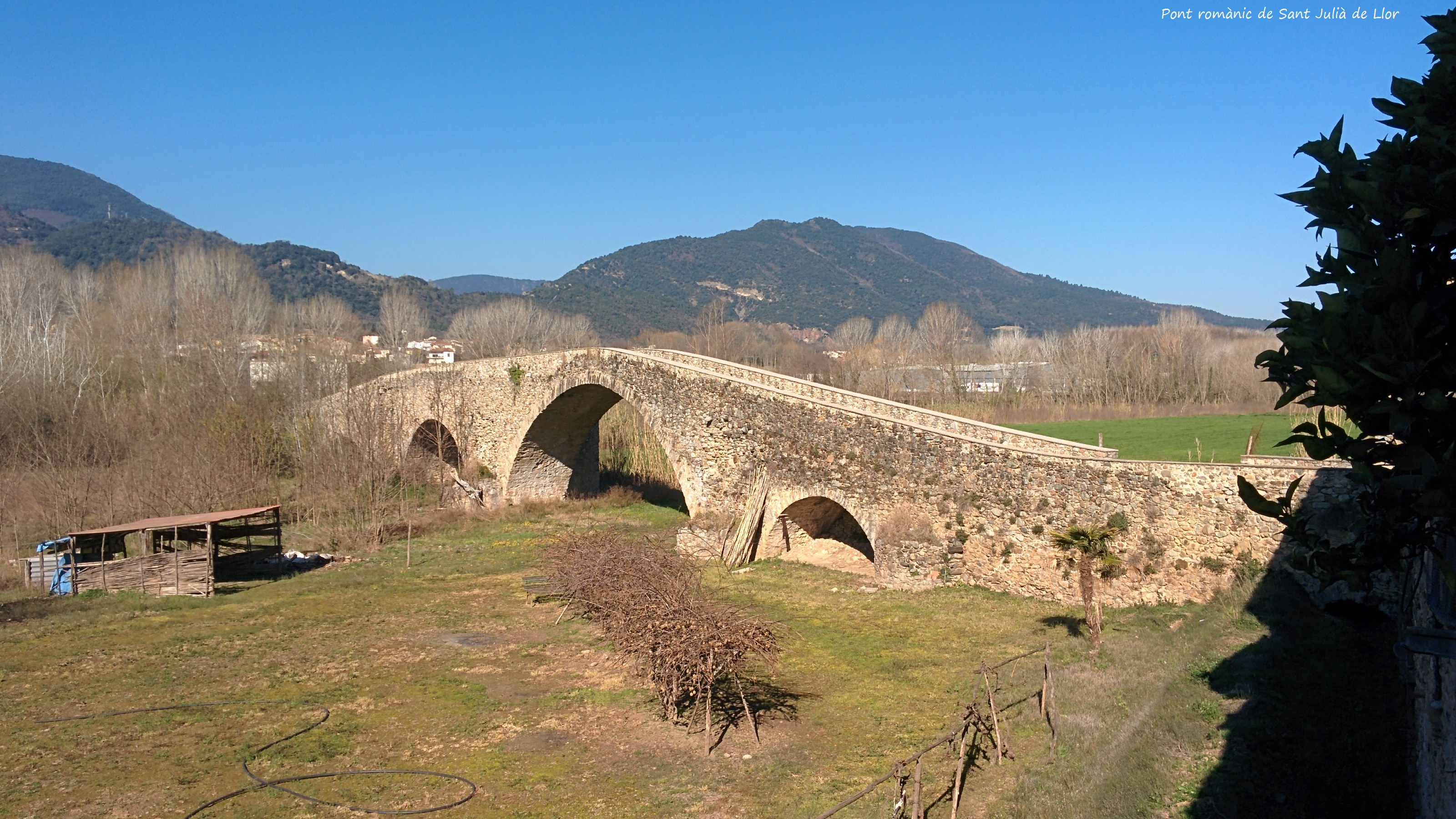 Pont Vell (Sant Julià del Llor i Bonmatí)